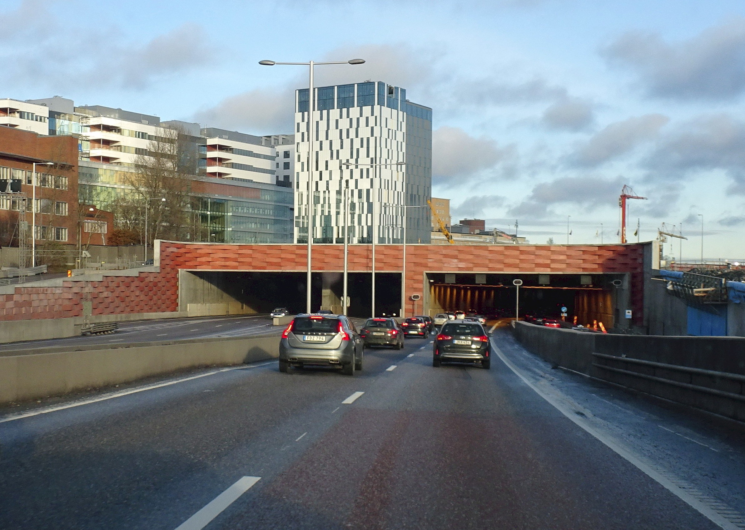 Norra Länkens tunnelmynning från väster i höjd med Hagastaden, Nya Karolinska i bakgrunden